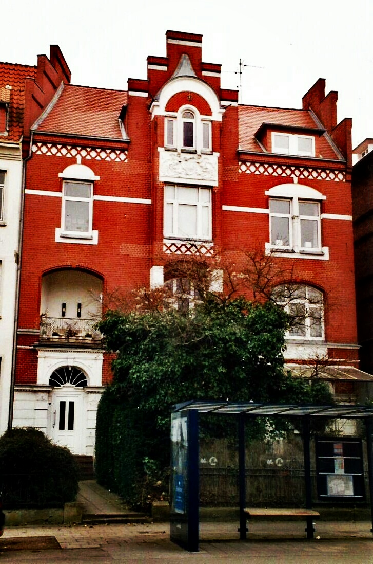 In diesem Hause befand sich die Wohnung von Albin Möbusz.